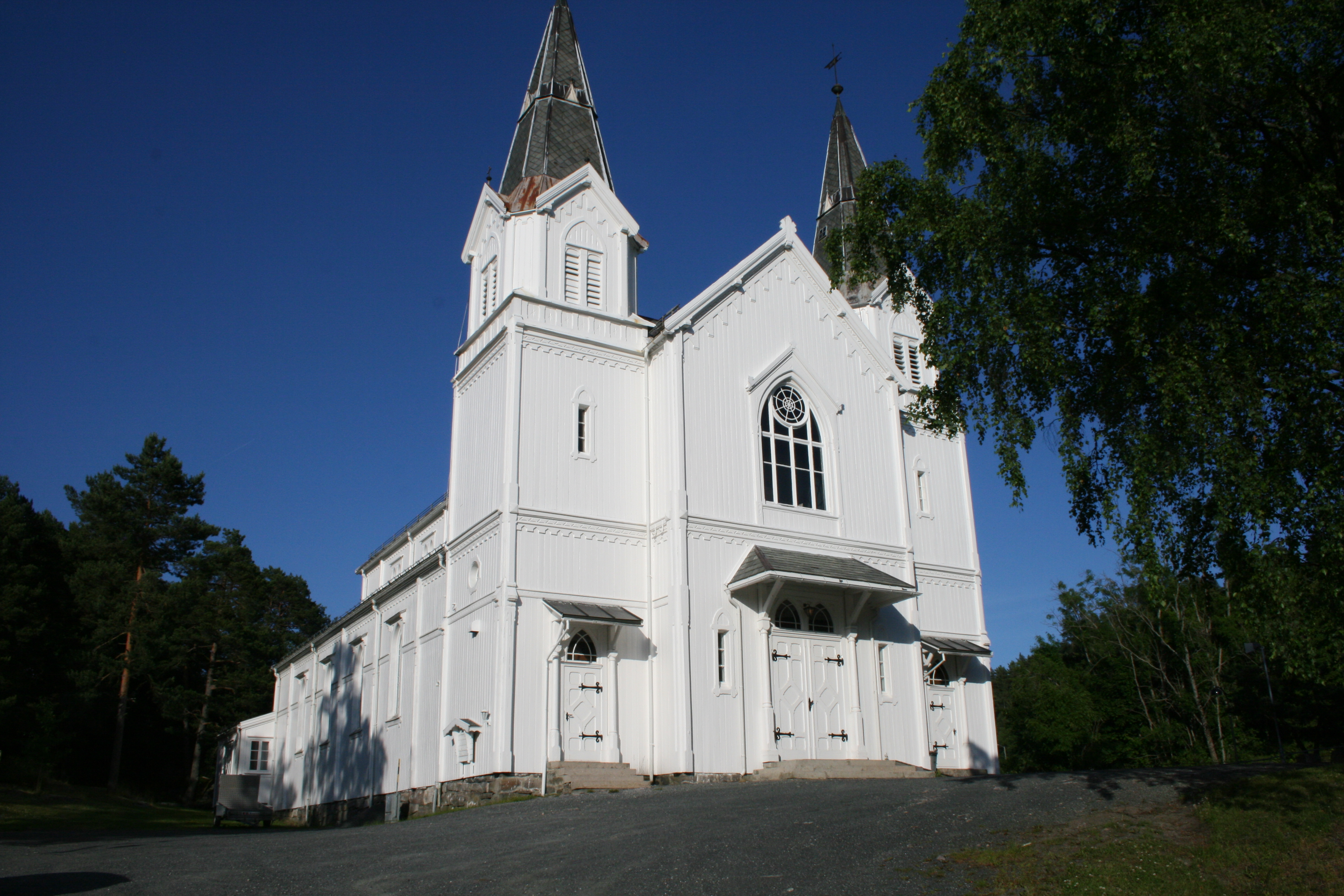 Frydendal kirke